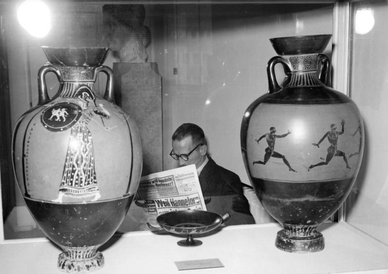 Roemer-Pelizaeus-Museum Zwei Panathenäische Preisamphoren 3. Jahrhundert vor Christus Information added by Wikimedia users.